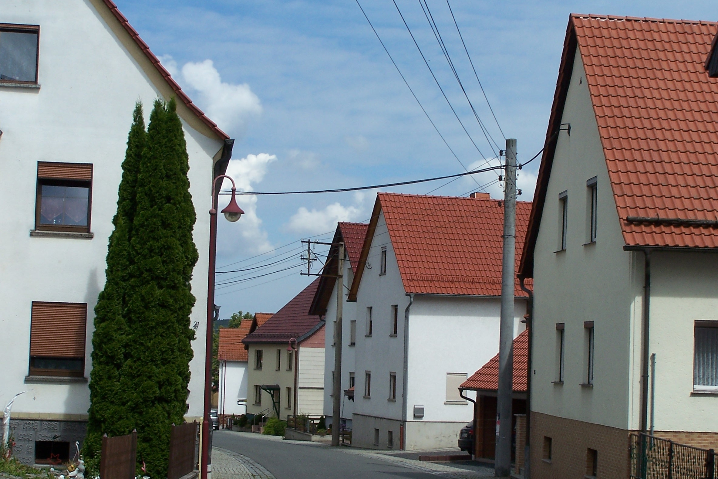 Ansichten, Details und Bauwerke im Ort.